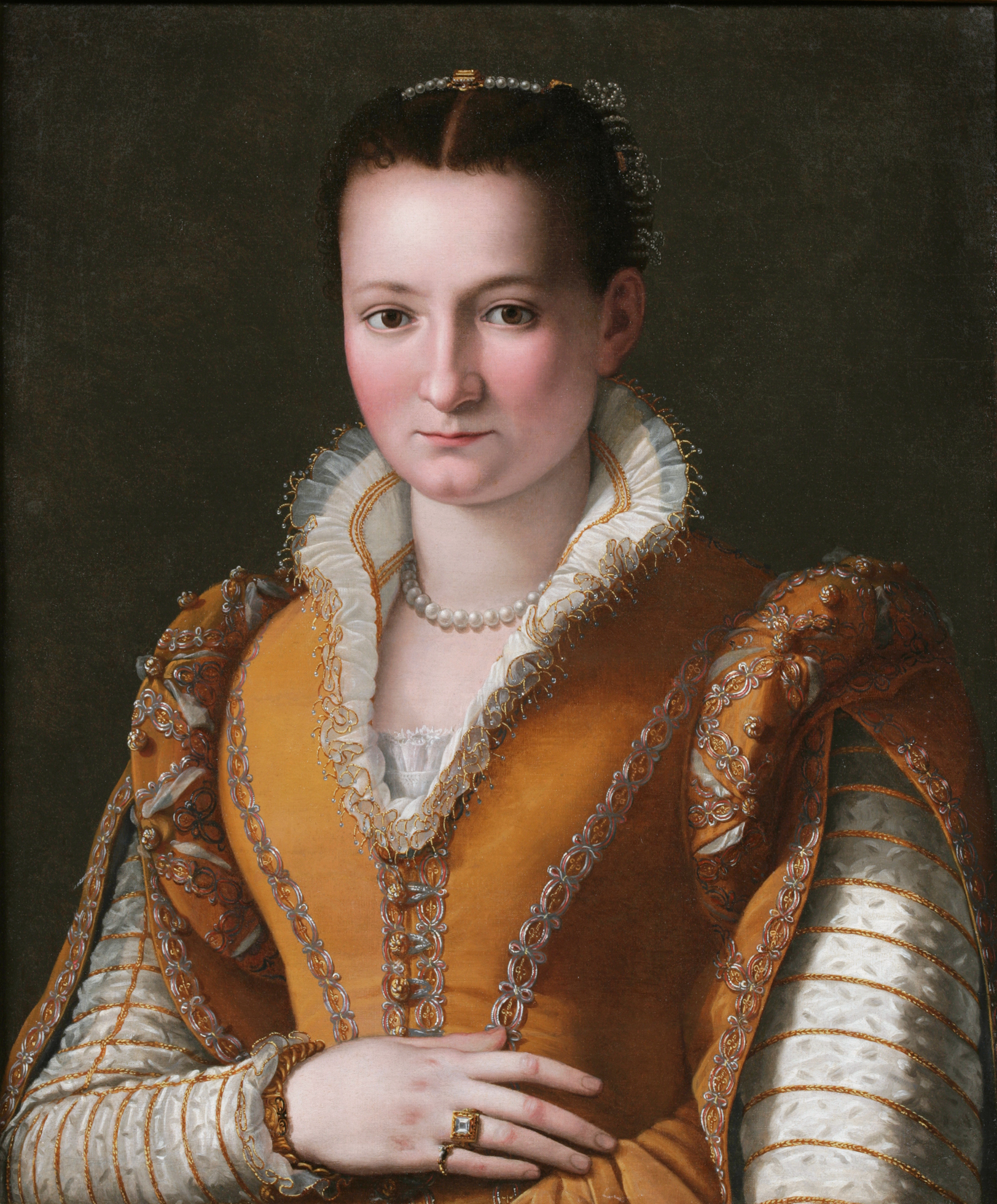 Possibly Bianca Capello de'Medici